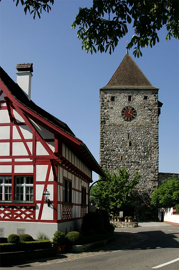 Oberer Turm in Kaiserstuhl